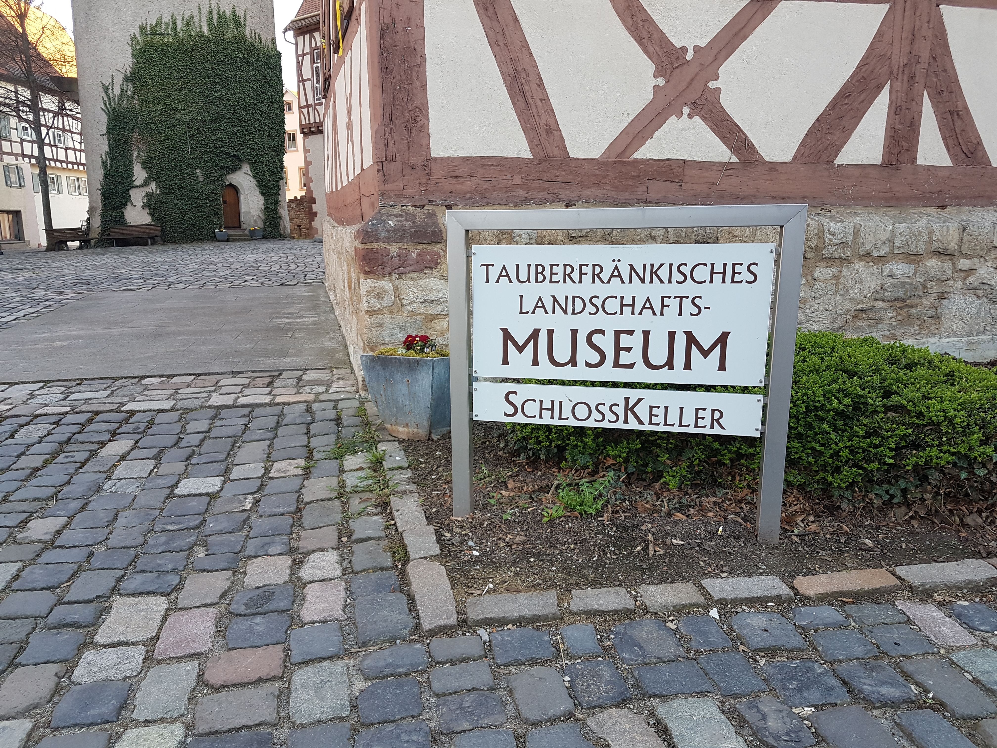 Kurmainzisches Schloss Tauberbischofsheim mit Türmersturm und Tauberfränkischem Landschaftsmuseum